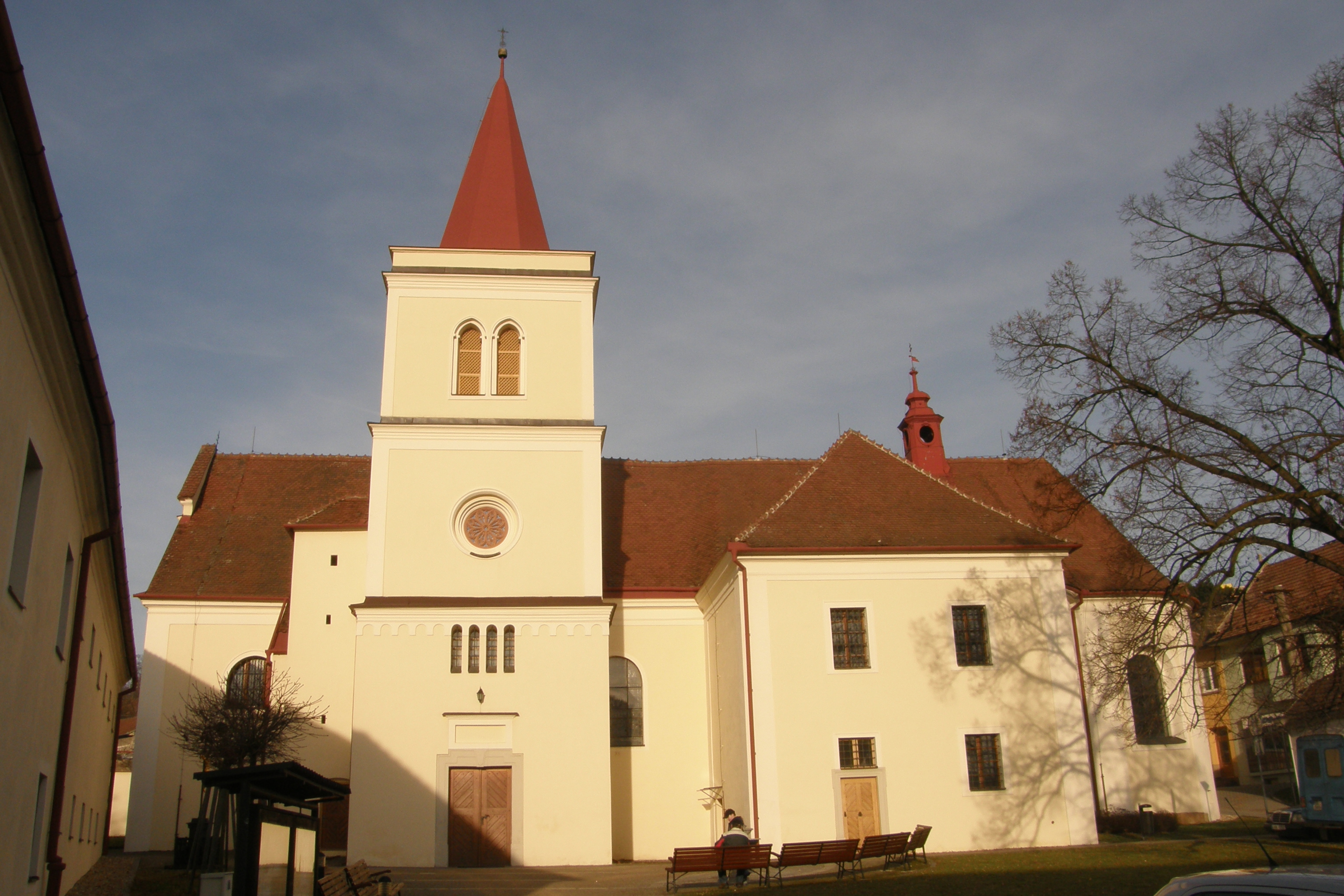 Kostel svatého Petra a Pavla v Lysicích v okrese Blansko